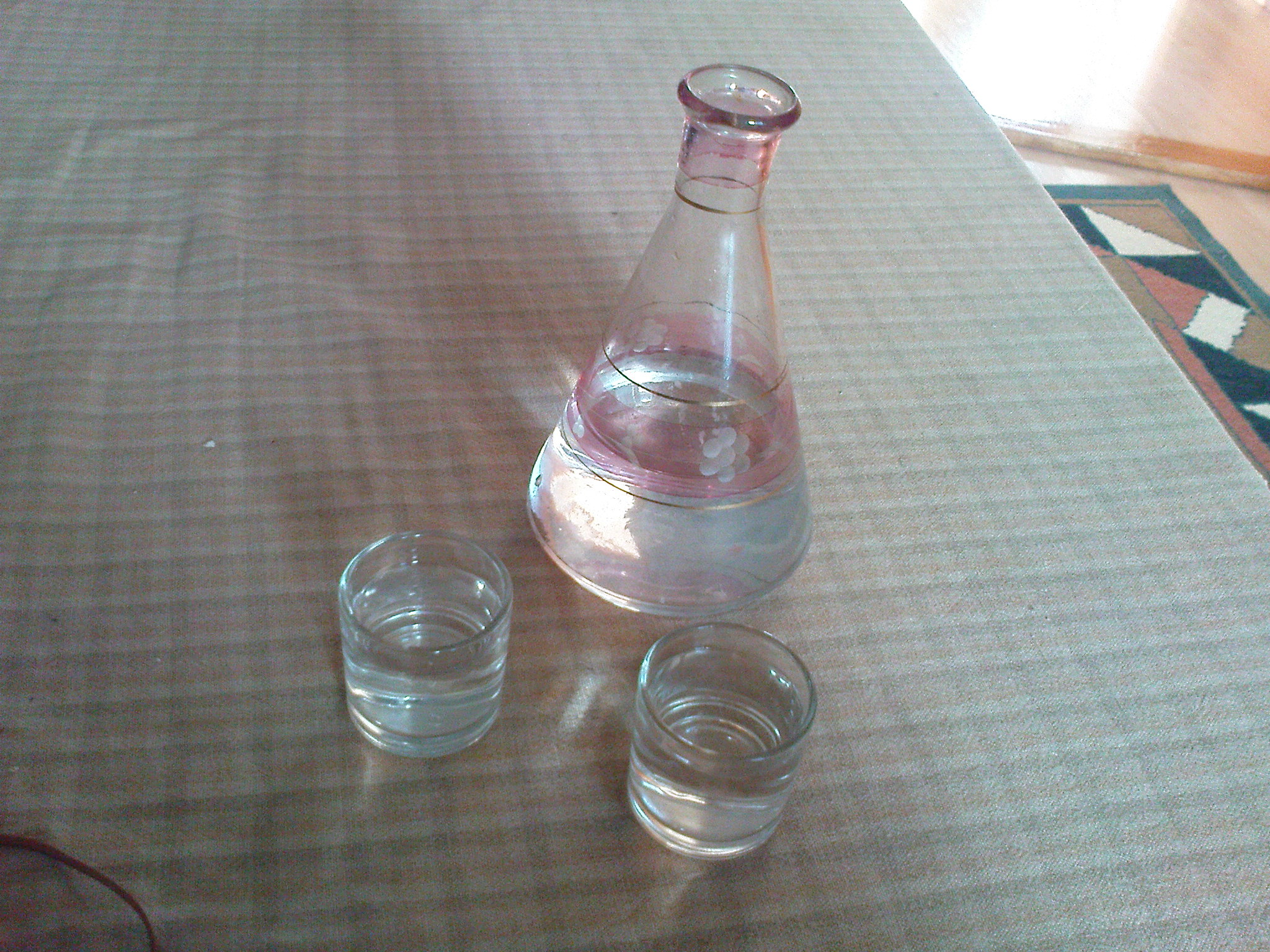 Ракија, сликао ја